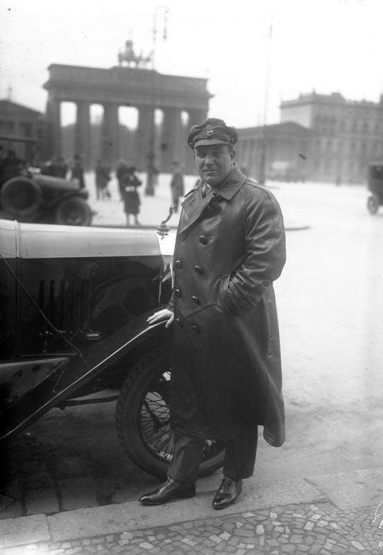 Richard Tauber, bedeutender Operntenor.